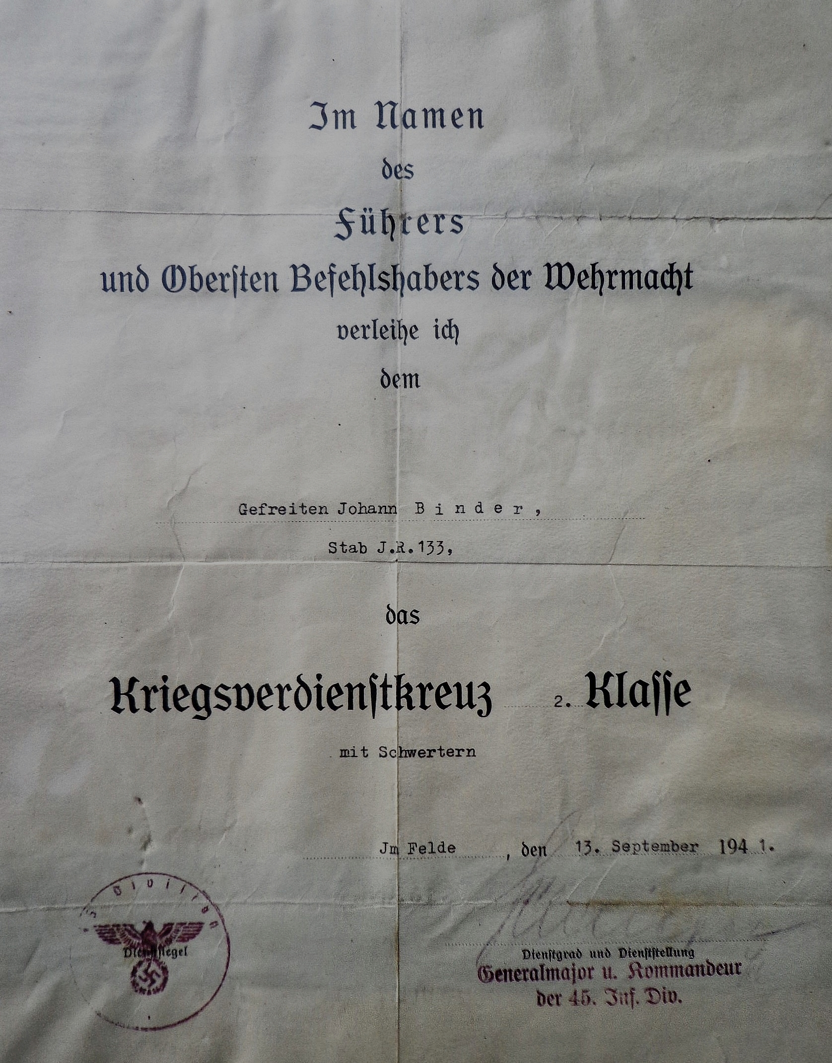 Verleihungsurkunde für das Kriegsverdienstkreuz 2. Klasse mit Schwertern, ausgestellt am 13. September 1941 für Johann Binder, damals im Dienstgrad eines Gefreiten im Infanterieregiment 133. Binder wurde 1911 in Reichersberg am Inn/Oberösterreich geboren, erlernte den Beruf eines Fleischhauers und hatte aus seiner 1940 in St Marienkirchen bei Schärding geschlossenen Ehe zwei Kinder. Er fiel im Mai 1945, damals im Dienstgrad eines Unteroffiziers, in Niederösterreich und ist im Soldatenfriedhof Allentsteig begraben.